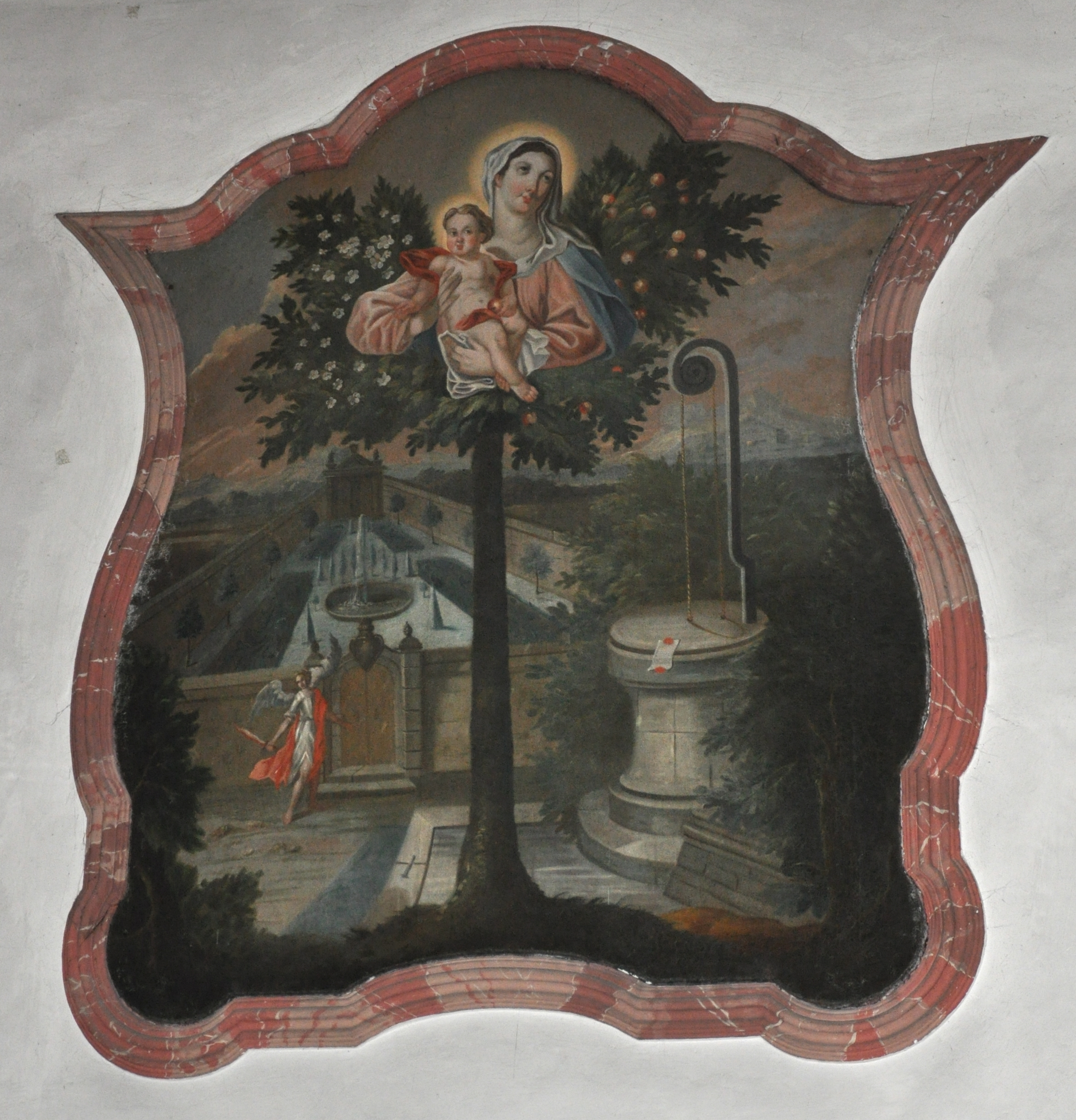 Ravensburg, Kirche Mariatal bei Weißenau (ehem. Klosterkirche des Frauenklosters Mariatal); Wandgemälde von Jacob Carl Stauder, 1738 Maria mit dem Jesuskind als "Frucht der Erlösung" im Baum des Lebens/der Erkenntnis, daneben der "Hortus conclusus" (verschlossene Paradiesgarten) und der versiegelte Brunnen der Gnaden